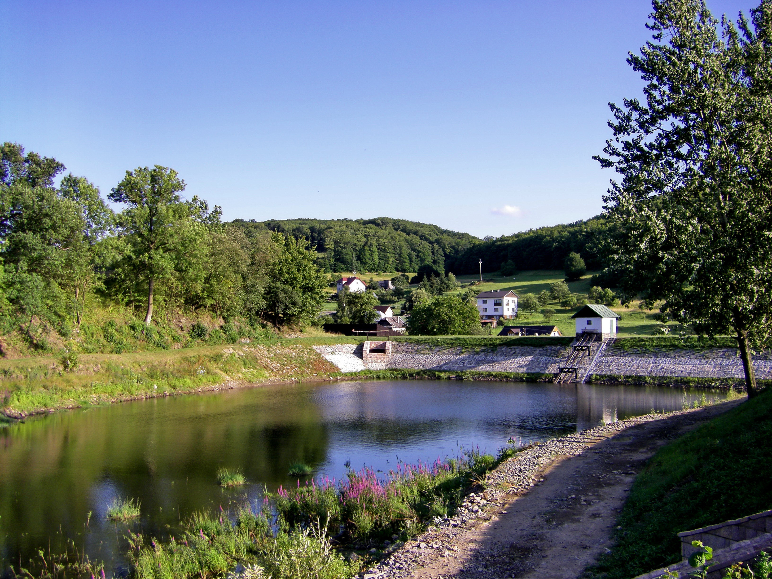 Nádrž vodná